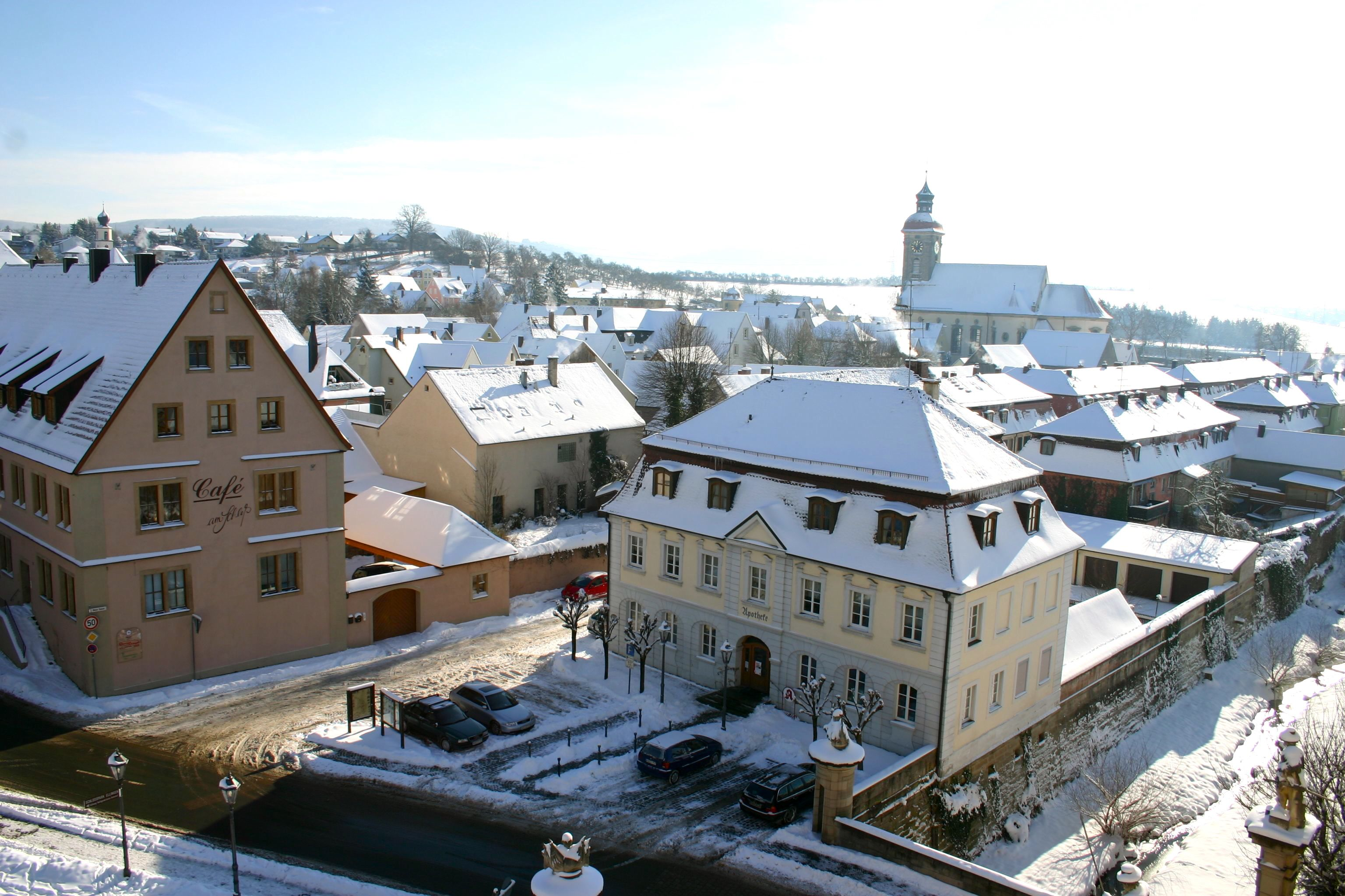 Stadtansicht_Ellingen